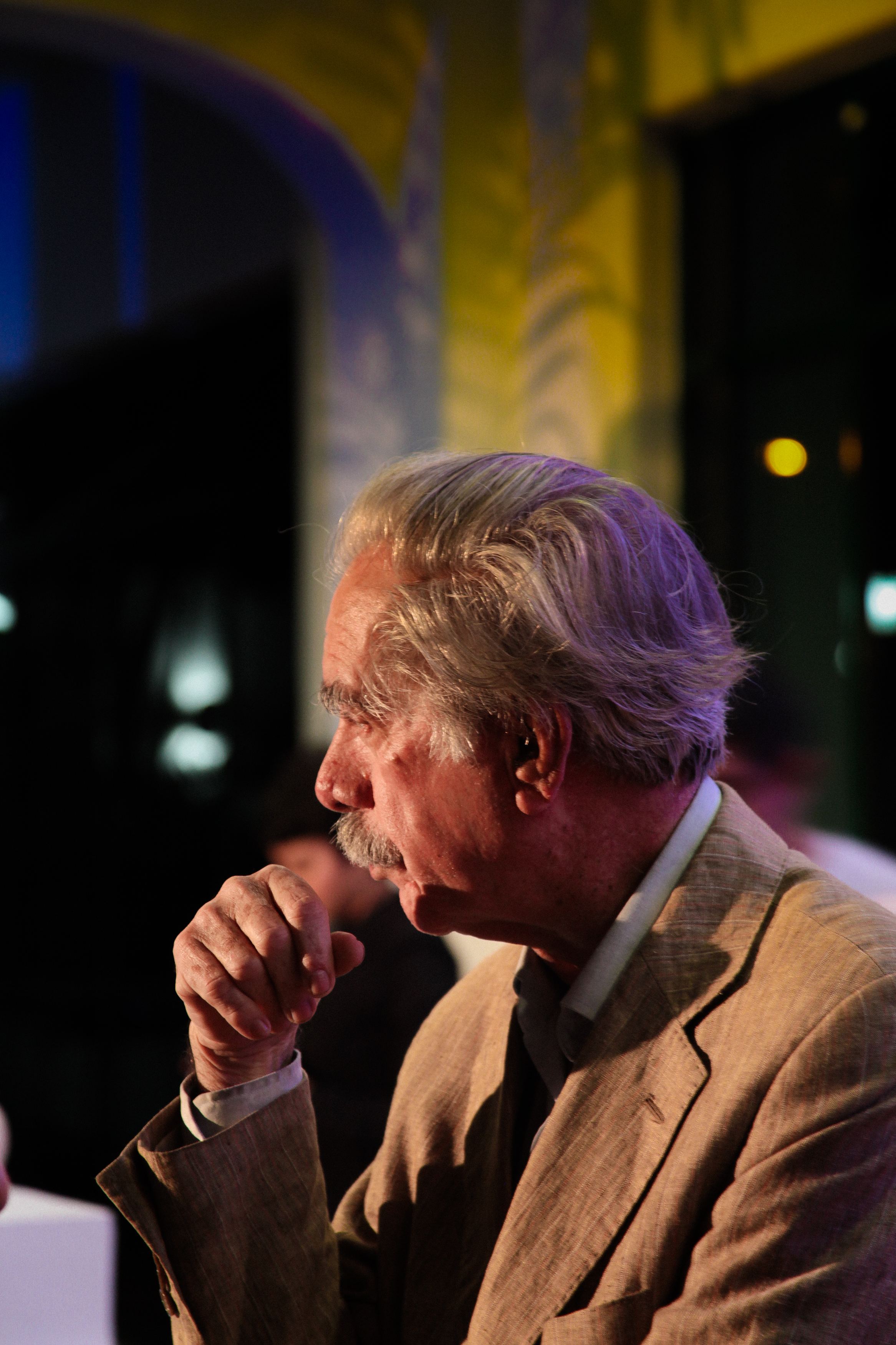 Retrato de Juan Calzadilla